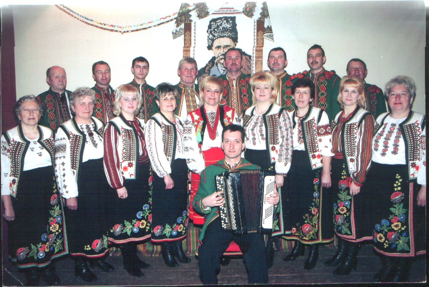 Творчий самодіяльний колектив села Мавковичі.